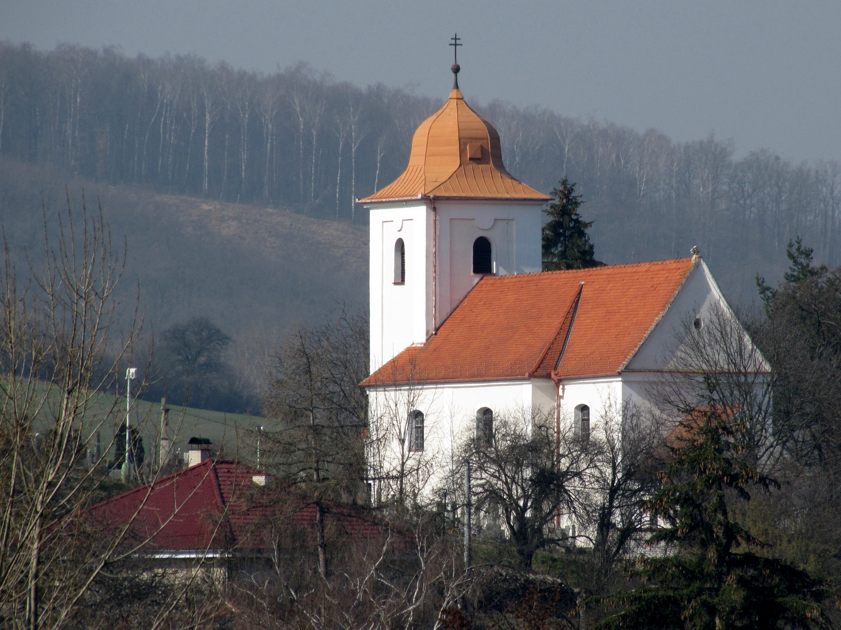 Kostel svatého Filipa a Jakuba v Kyjově - Bohuslavicích. Pohled z cyklostezky.